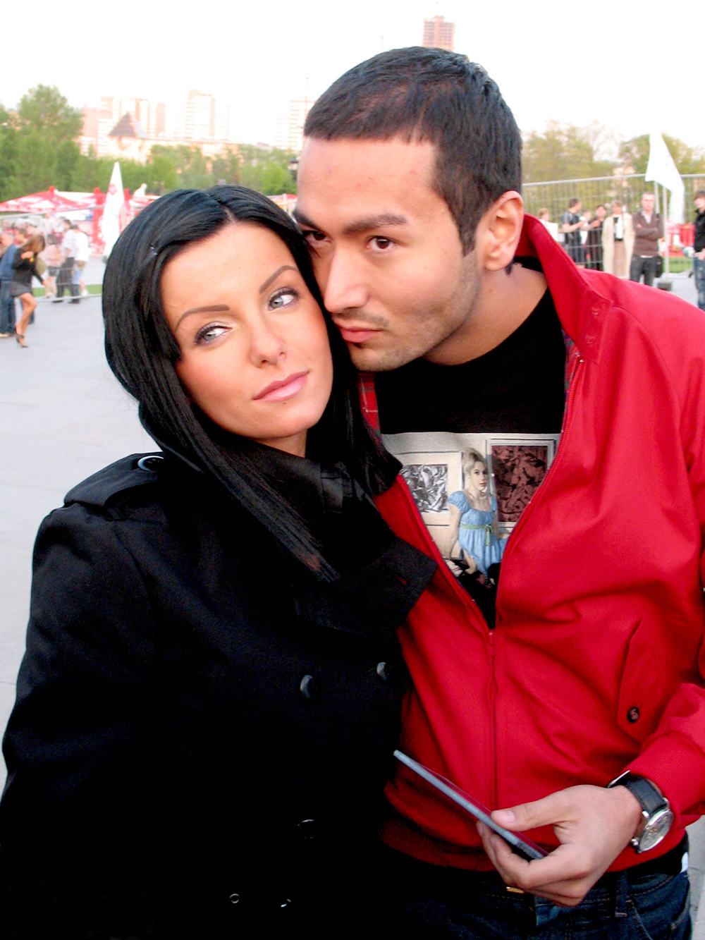 Julia Volkova and Parviz in Moscow